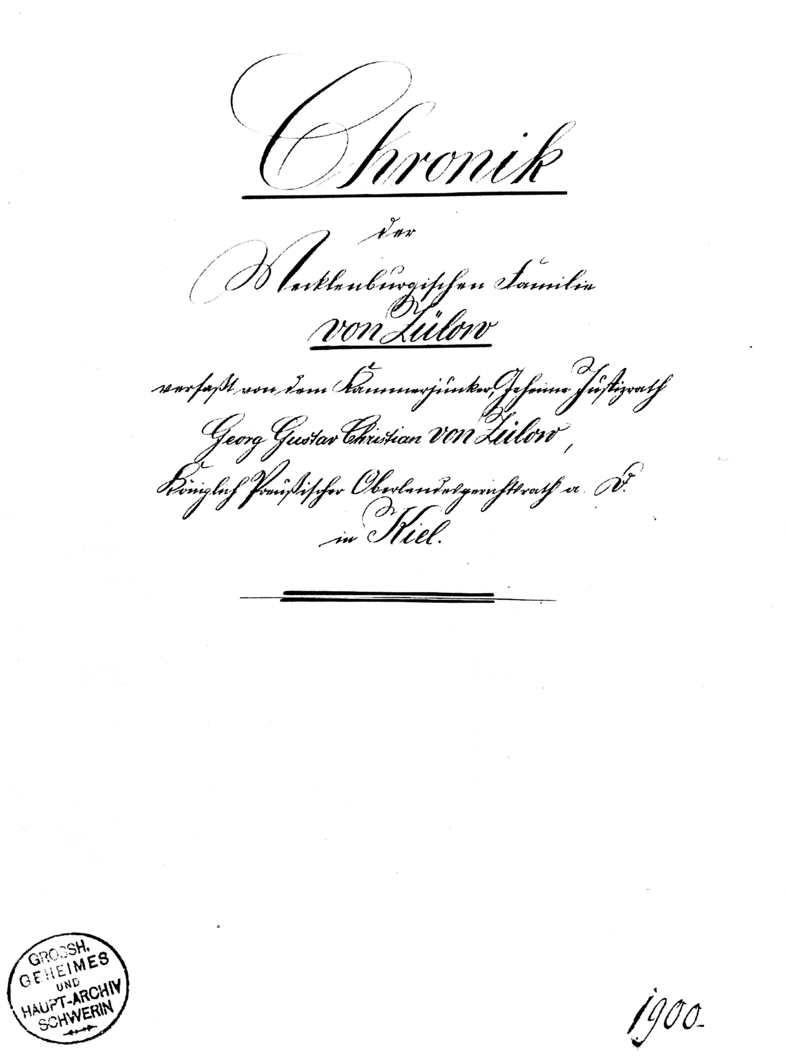 Titelseite des Buches von Georg Gustav Christian von Zülow: "Chronik der Mecklenburgischen Familie von Zülow". Kiel 1900, Handschrift, 71 Seiten Datum: 1900 Urheber: Georg Gustav Christian von Zülow Quelle: Buch "Chronik der Mecklenburgischen Familie von Zülow"